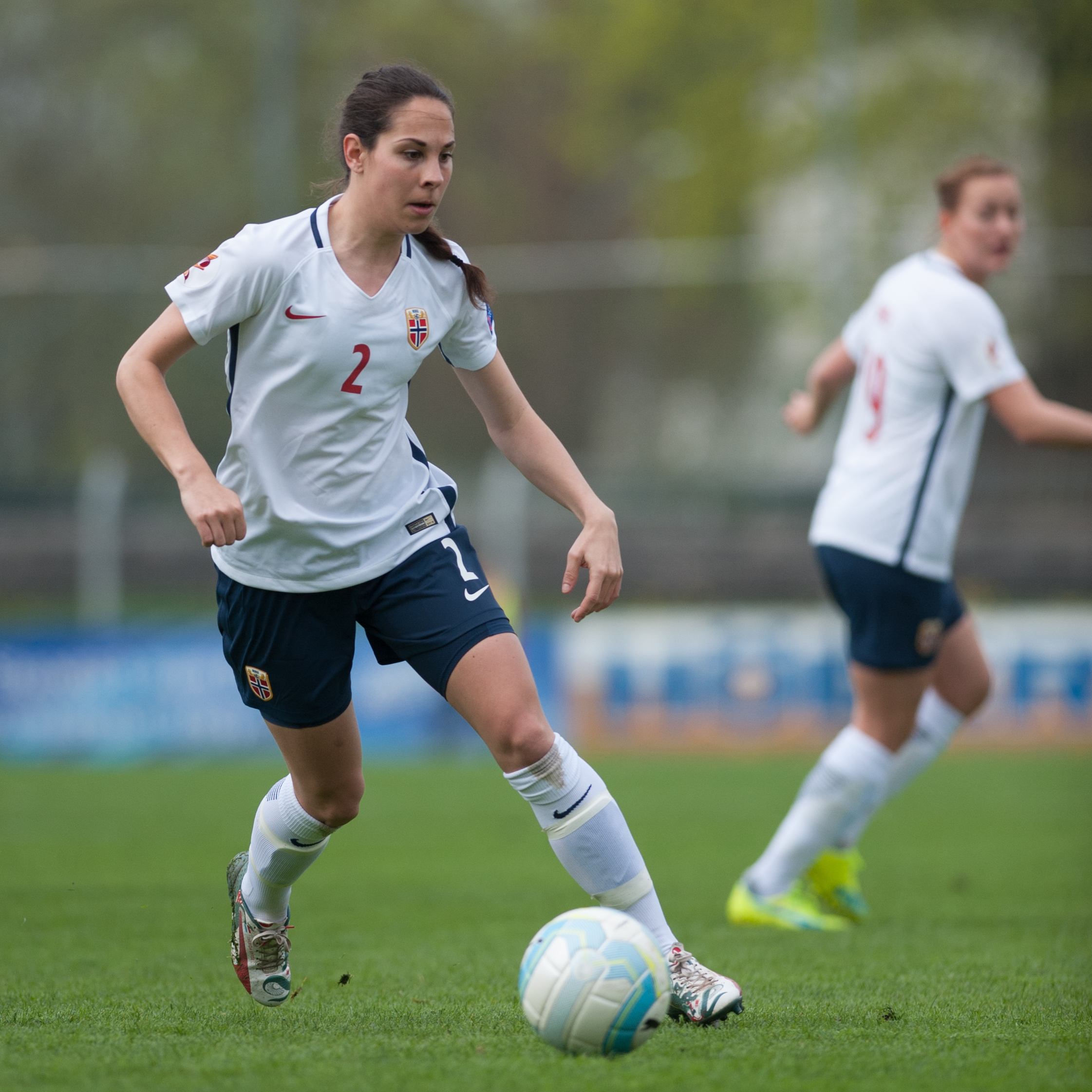 Steyr, Austria, 10.04.2016, ÖFB Frauen EM-Qualifikation - Österreich vs Norwegen. Bild zeigt Ingrid Wold (NOR).